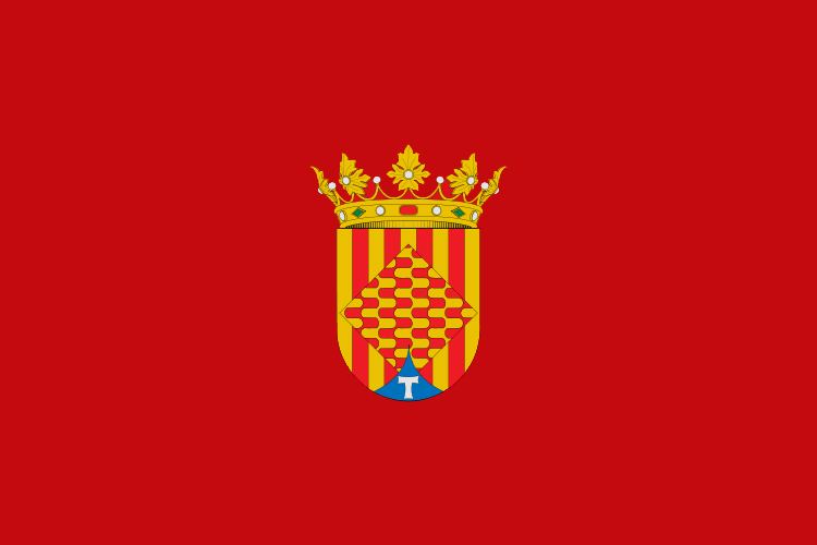 bandera de la diputació de tarragona